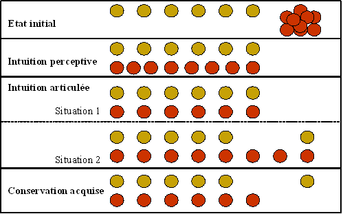 Auteur: yugiz Description: Schéma de l'épreuve Piagétienne de la conservation du nombre.